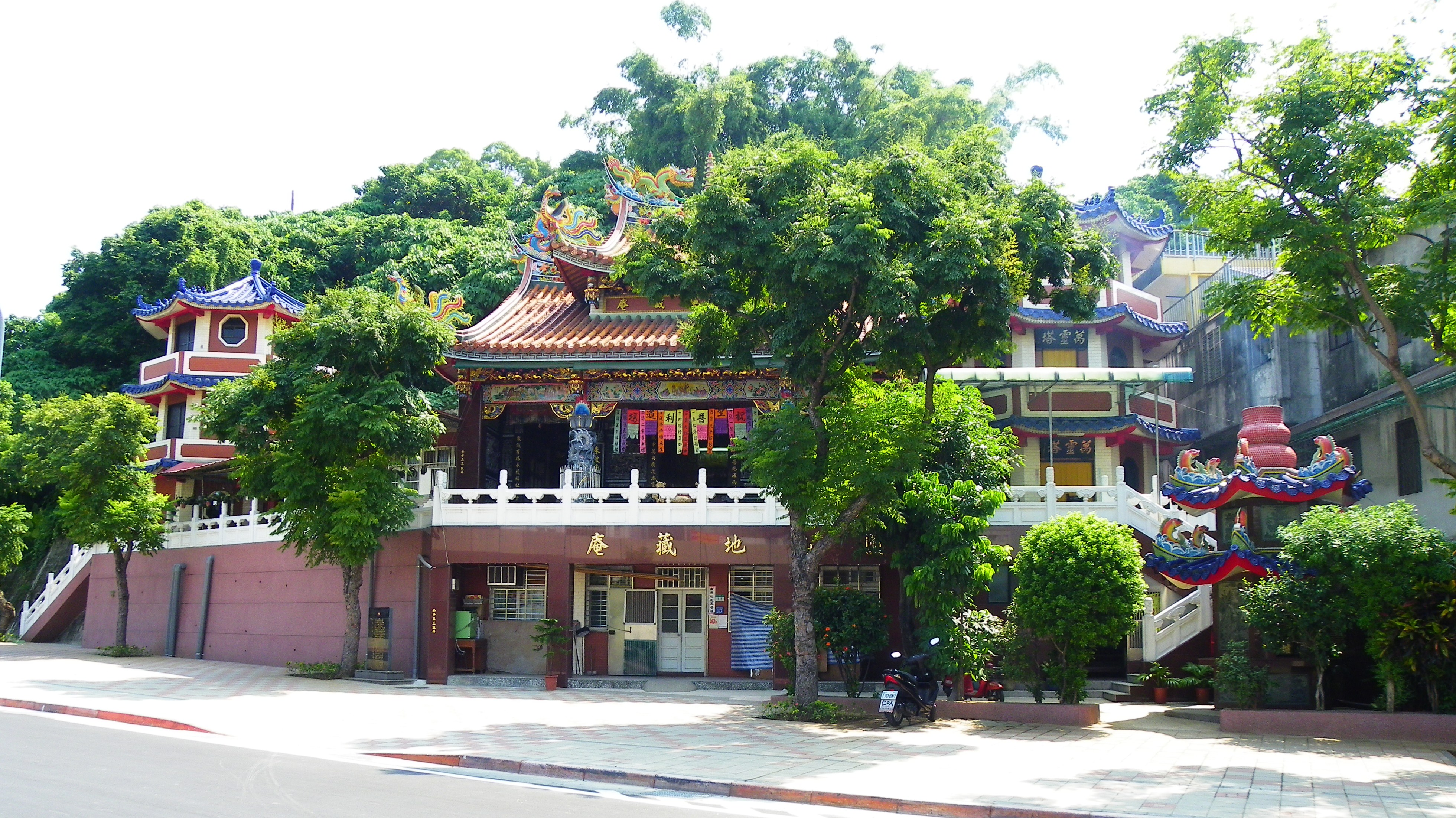 中文（台灣）: 圓山地藏庵，位於臺灣臺北市中山區玉門街11號。